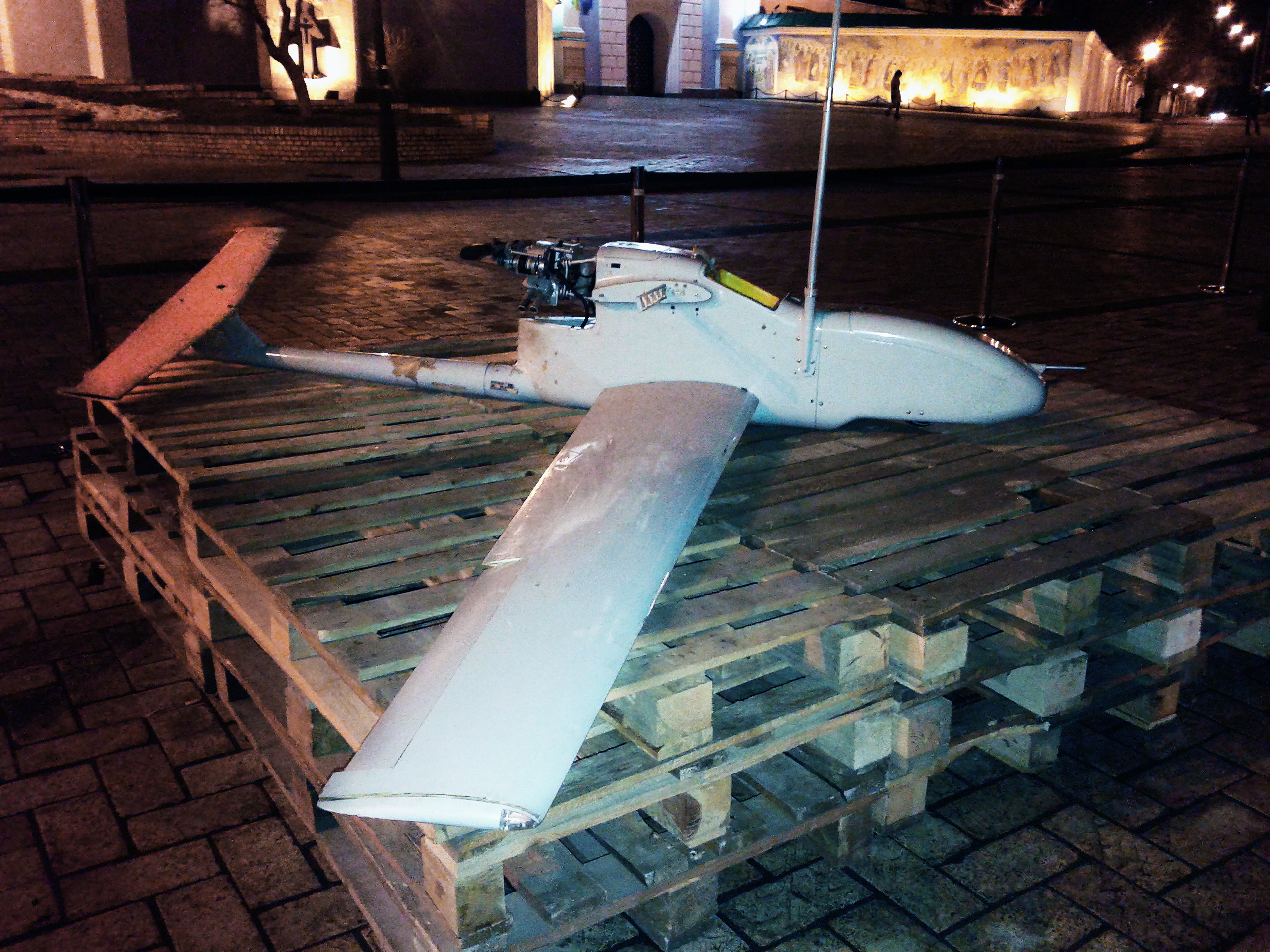 Безпілотний літальний апарат «Гранат-Ч» БПЛА проводив повітряну розвідку місць дислокації підрозділів Збройних сил України 27 листопада 2014 р. у районі м. Щастя Луганської області, де і був збитий. Після аналізу розвідувальної інформації, що була збережена на борту літального апарата, встановлено, що зліт БПЛА був здійснений з території Російської Федерації поблизу населеного пункту ЄланьТарасовського району Ростовської області. БПЛА розроблений ТОВ «Ижмаш - беспилотные системы» (м. Іжевськ, Російська Федерація). Надійшов на озброєння розвідувальних підрозділів Південного військового округу Збройних сил Російської Федерації у 2014 р. Виставка «Докази агресії російських військ на території України», Київ, лютий 2015